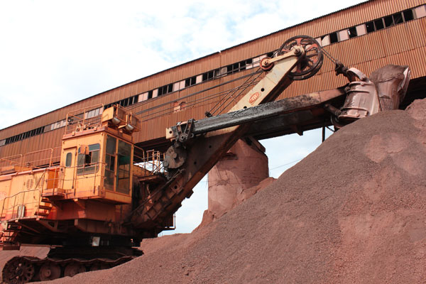 Руда для отправки